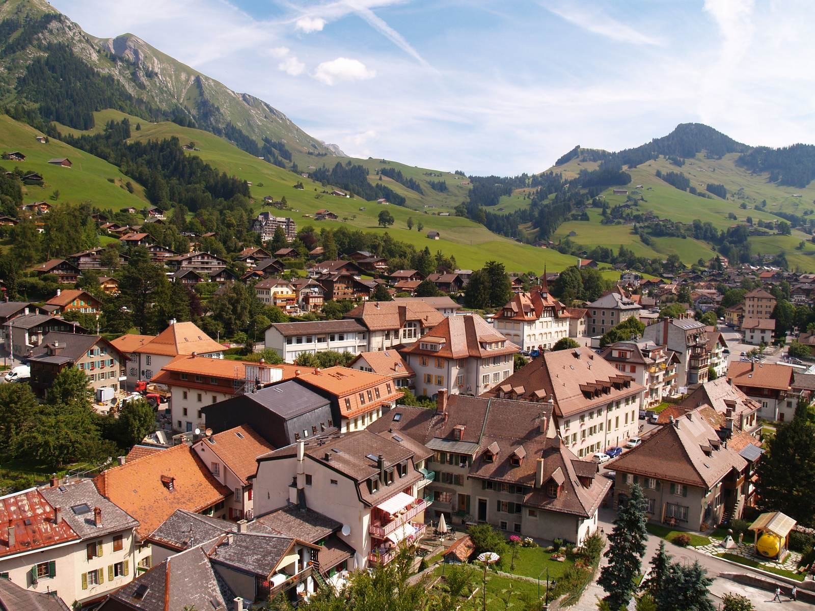 Château d'Oex visto dall'alto. Foto: S. Müller